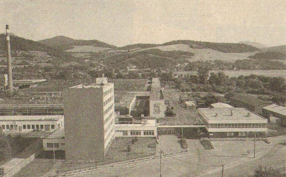 Kinex Bytča v roku 1985